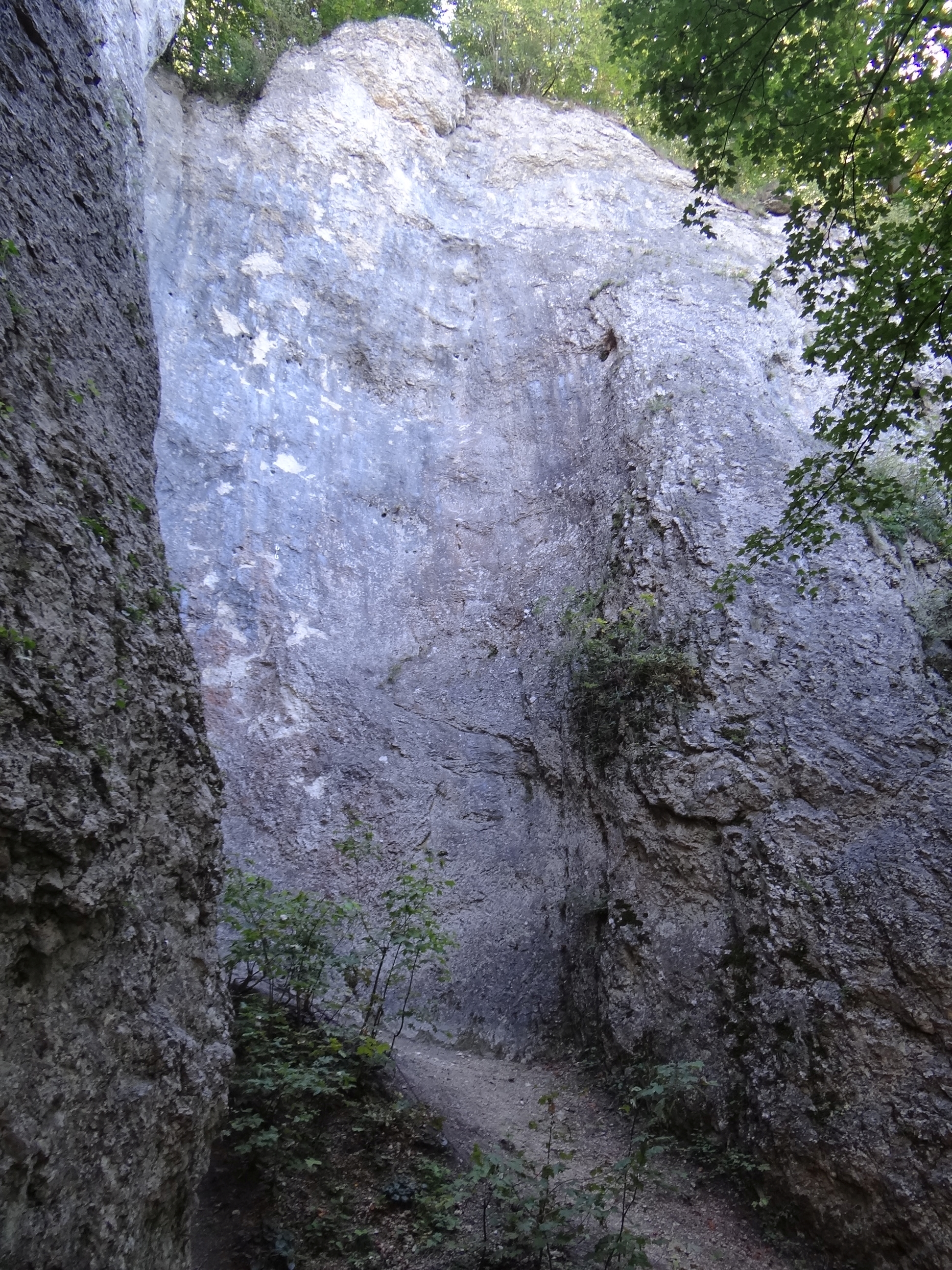 Skały Cmentarzyska w Dolinie Będkowskiej